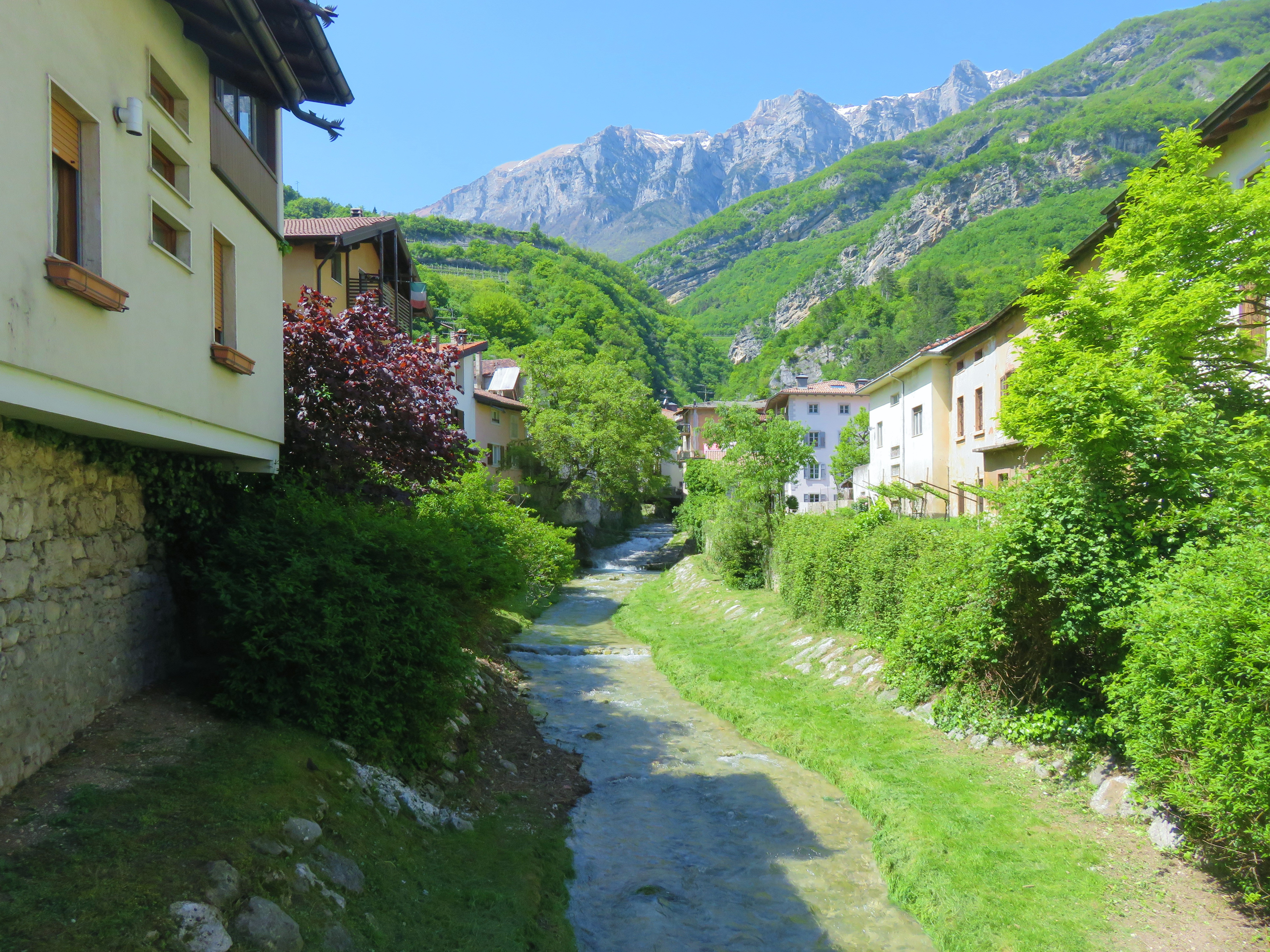 Il torrente Arione visto dal ponte su via Roma verso ovest.